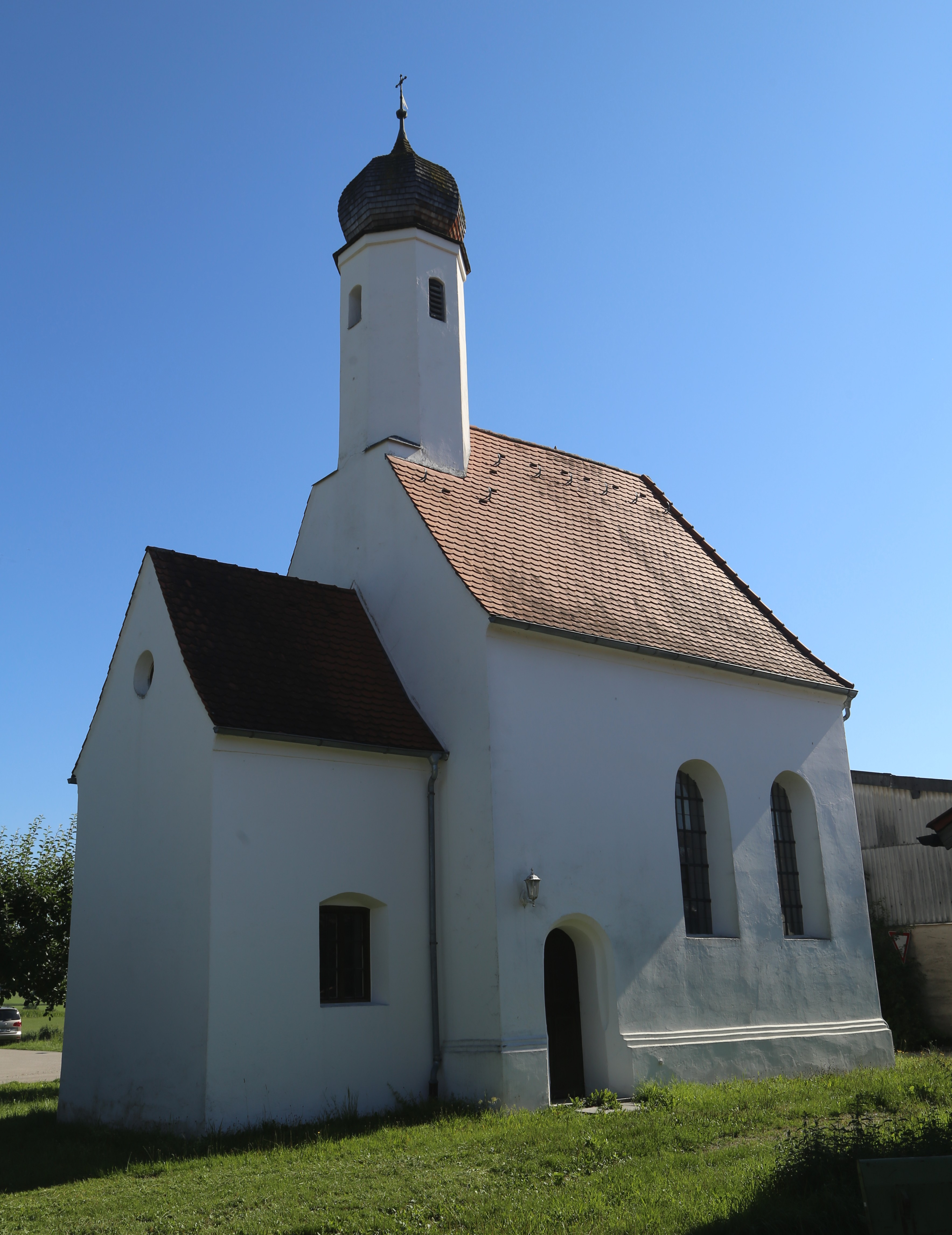 Innerthann 10, Tuntenhausen; Kath. Nebenkirche St. Dionysius, spätgotischer Saalbau mit Dreiseitschluss und Dachreiter über dem Westgiebel, Umgestaltung 1644, Dachreiter und Sakristei 1926; mit Ausstattung.